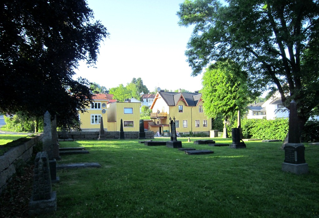 Bragernes nedre kirkegård, Drammen